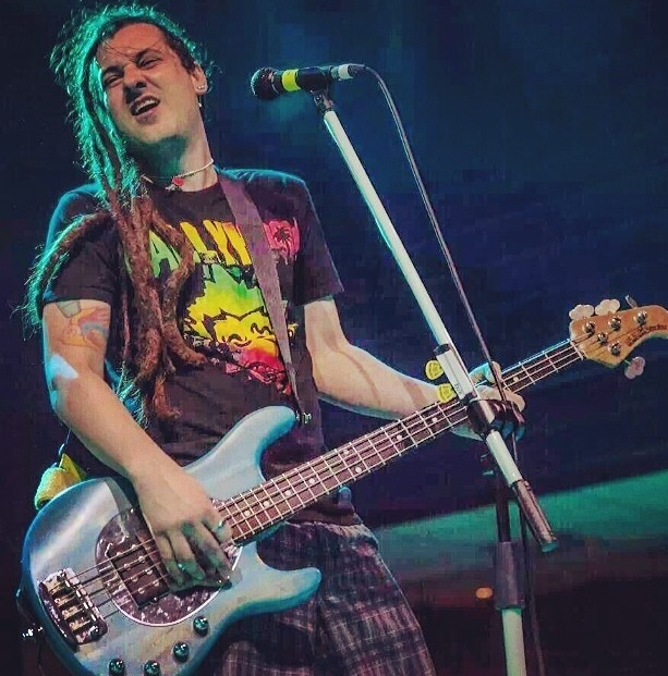 Limanorwich